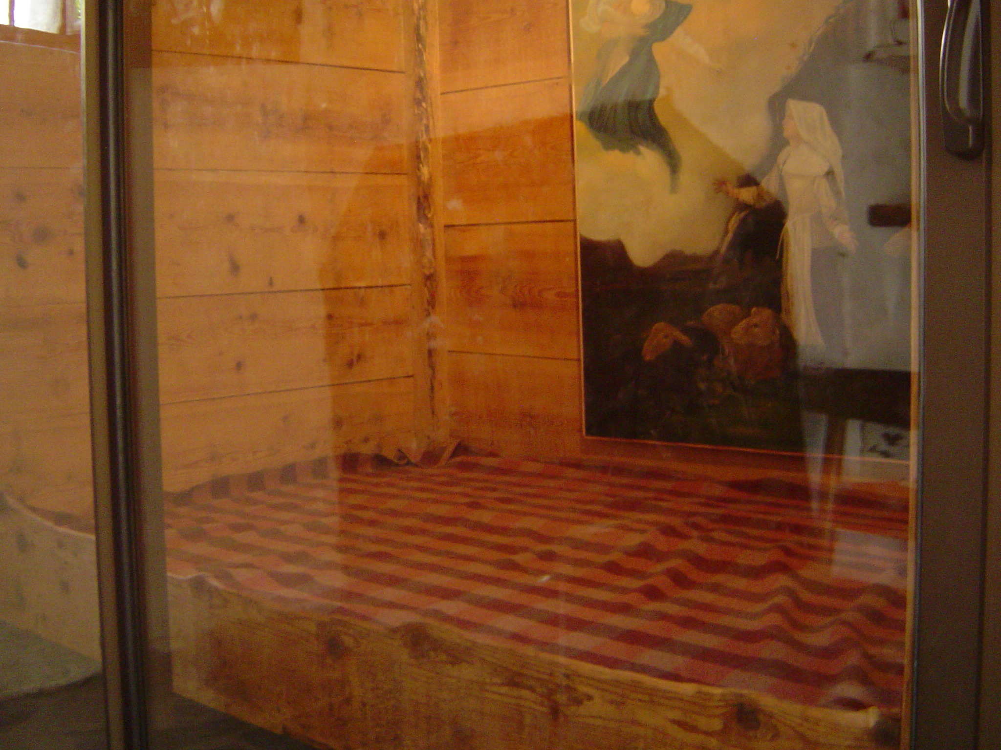 Photo prise à Notre-Dame-du-Laus